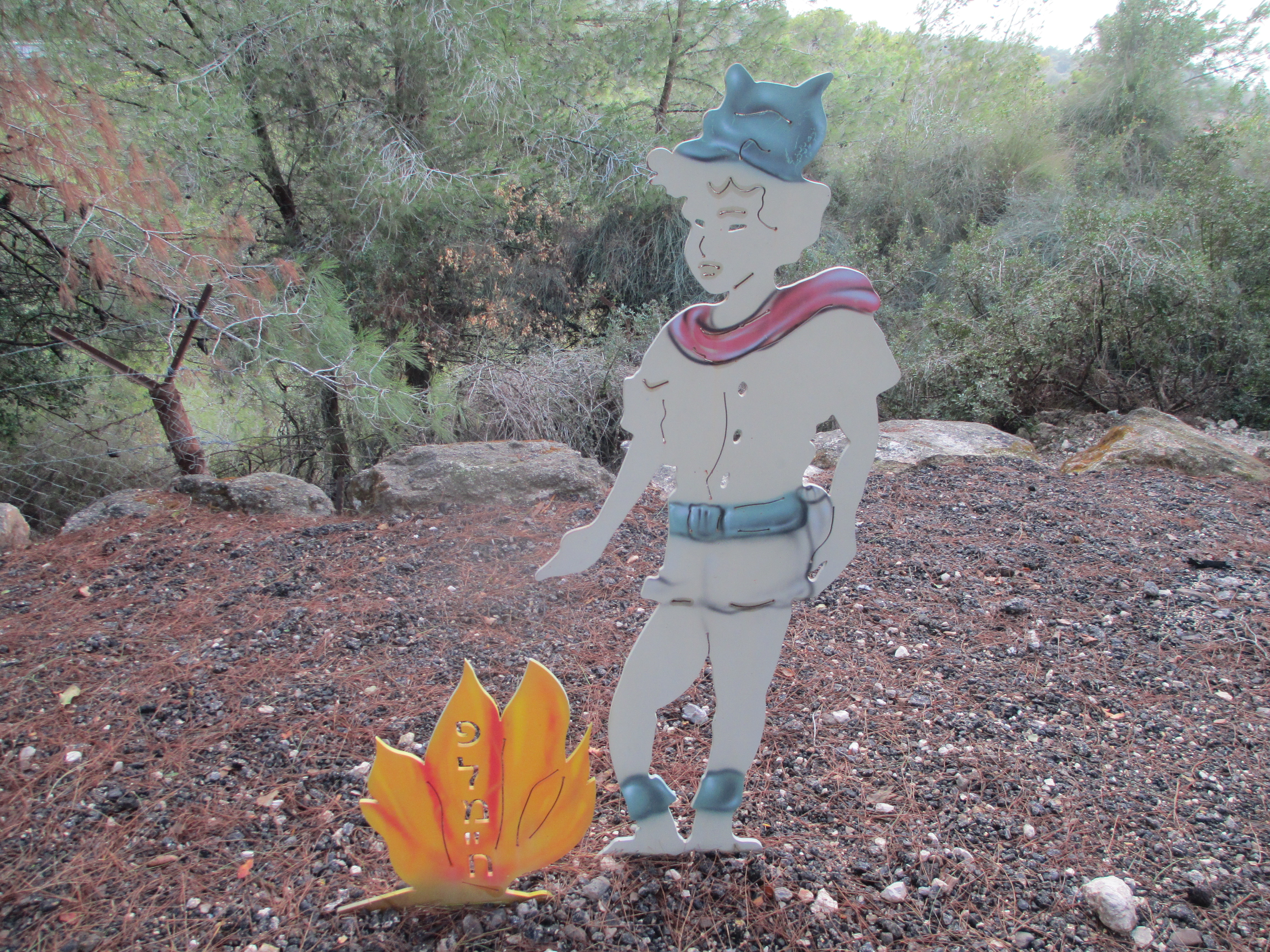 פסל מדורות הפלמ"ח - סייר